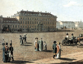 Вид на Дом Мятлевых в середине XVIII века.